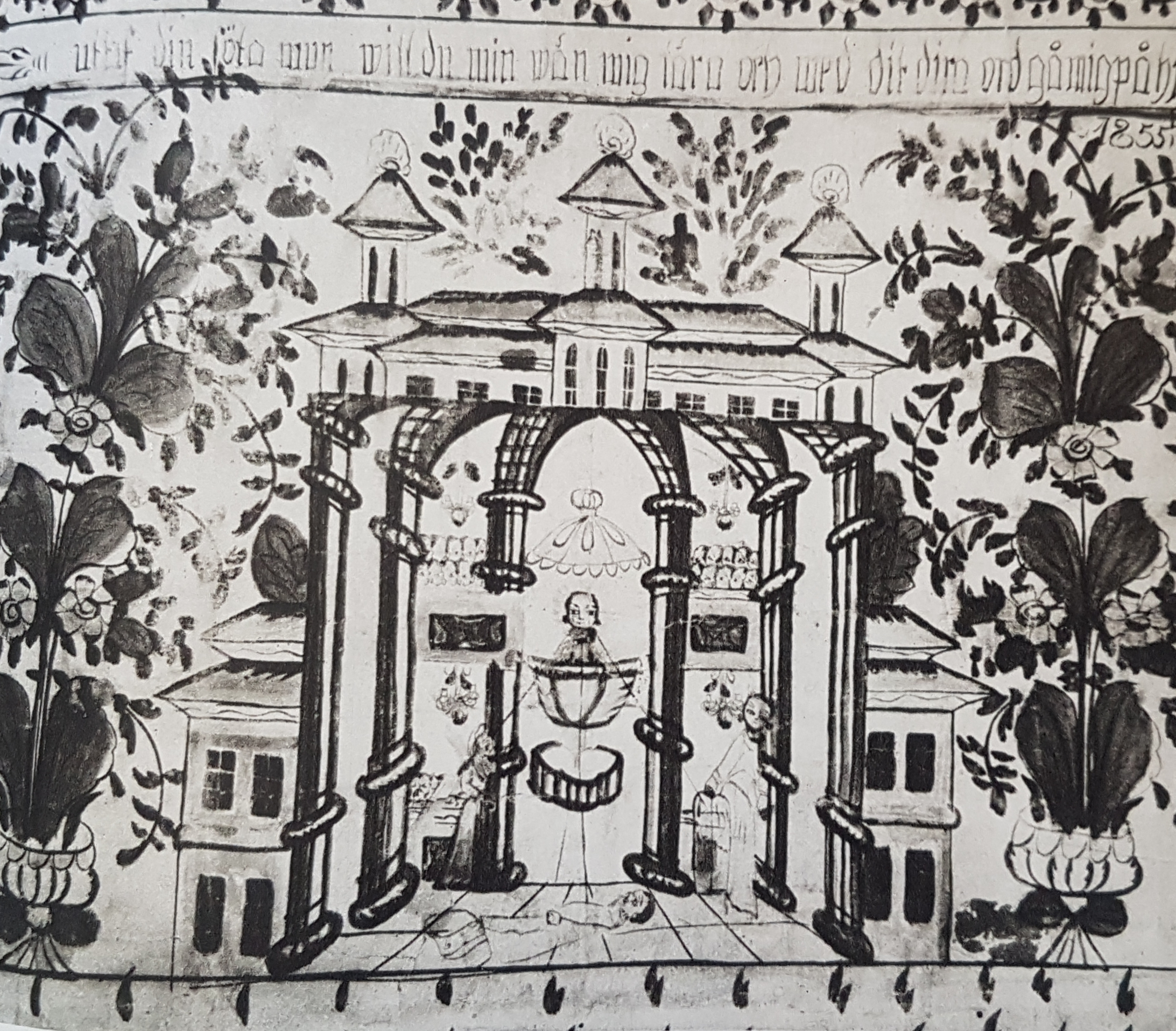 Om Guds predikande kärlek, målning på papper efter förlaga i Müllers Himmelska kärlekskyss 1855 målad av Mats Anders Olsson. Avfotograferad bild från Allhems Svenskt konstnärslexikon.